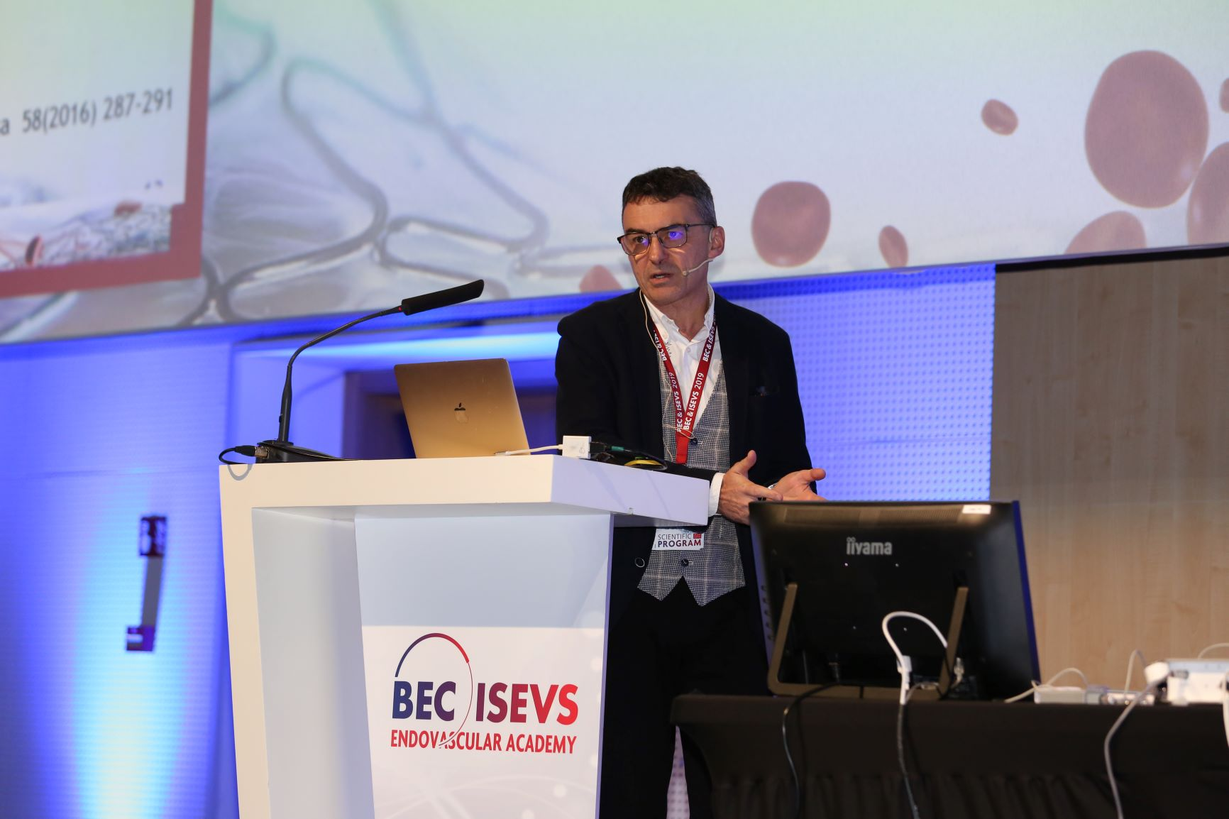 BEC & ISEVS Endovascular Academy 2019